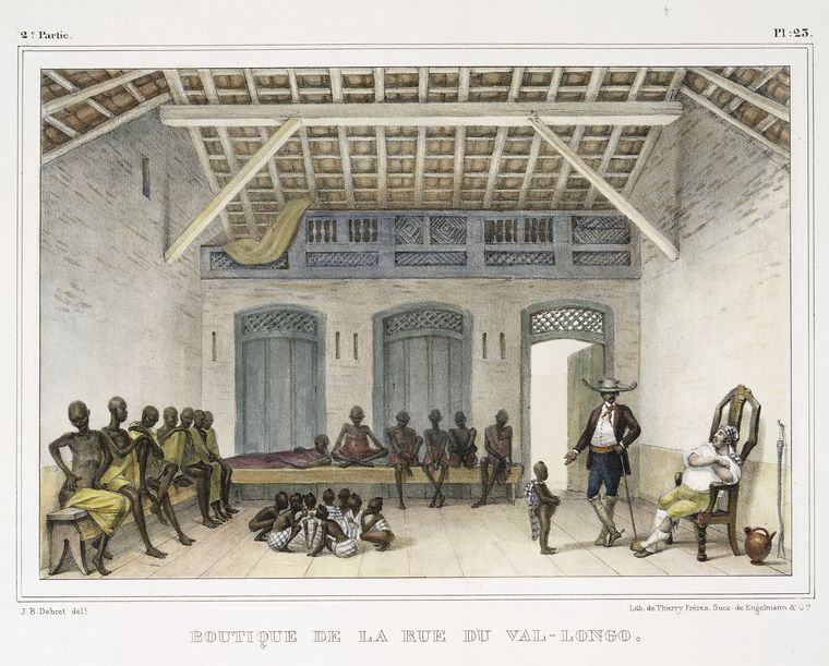 Voyage pittoresque et historique au Brésil, ou Séjour d'un artiste français au Brésil, depuis 1816 jusqu'en 1831 inclusivement, epoques de l'avènement et de l'abdication de S. M. D. Pedro 1er, fondateur de l'Empire brésilien. Dédié à l'Académie des Beaux-Arts de l'Institut de France.